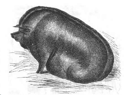 Essex-Eber des Herrn Hopp, 10 Monate alt; Preis 10 Pfd. Sterl.